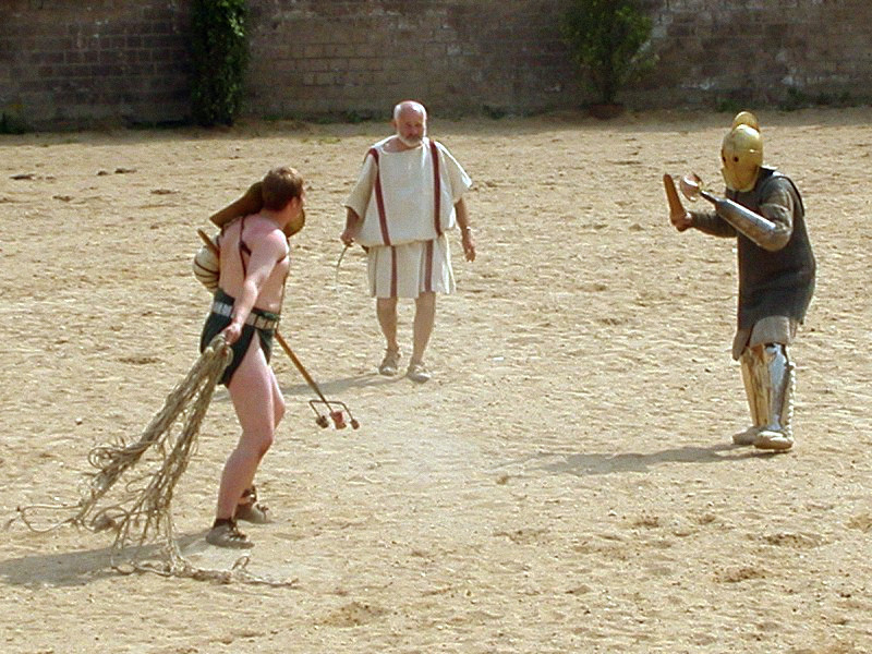 Retiarius gegen Scissor auf einem Römer-Fest in Xanten 2003.